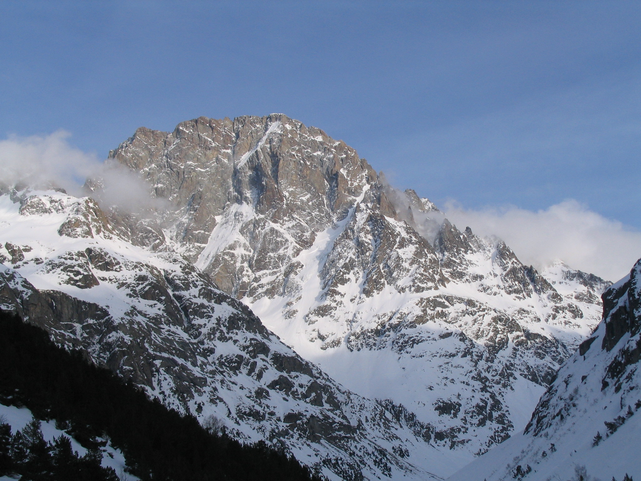 Face Nord-Ouest de l'Ailefroide, depuis le Plan du Carrellet (environ 1900m). 17 Avril 2006 Licensing Catégorie:Sommet des Alpes françaises Catégorie:Massif des Écrins catégorie:montagne